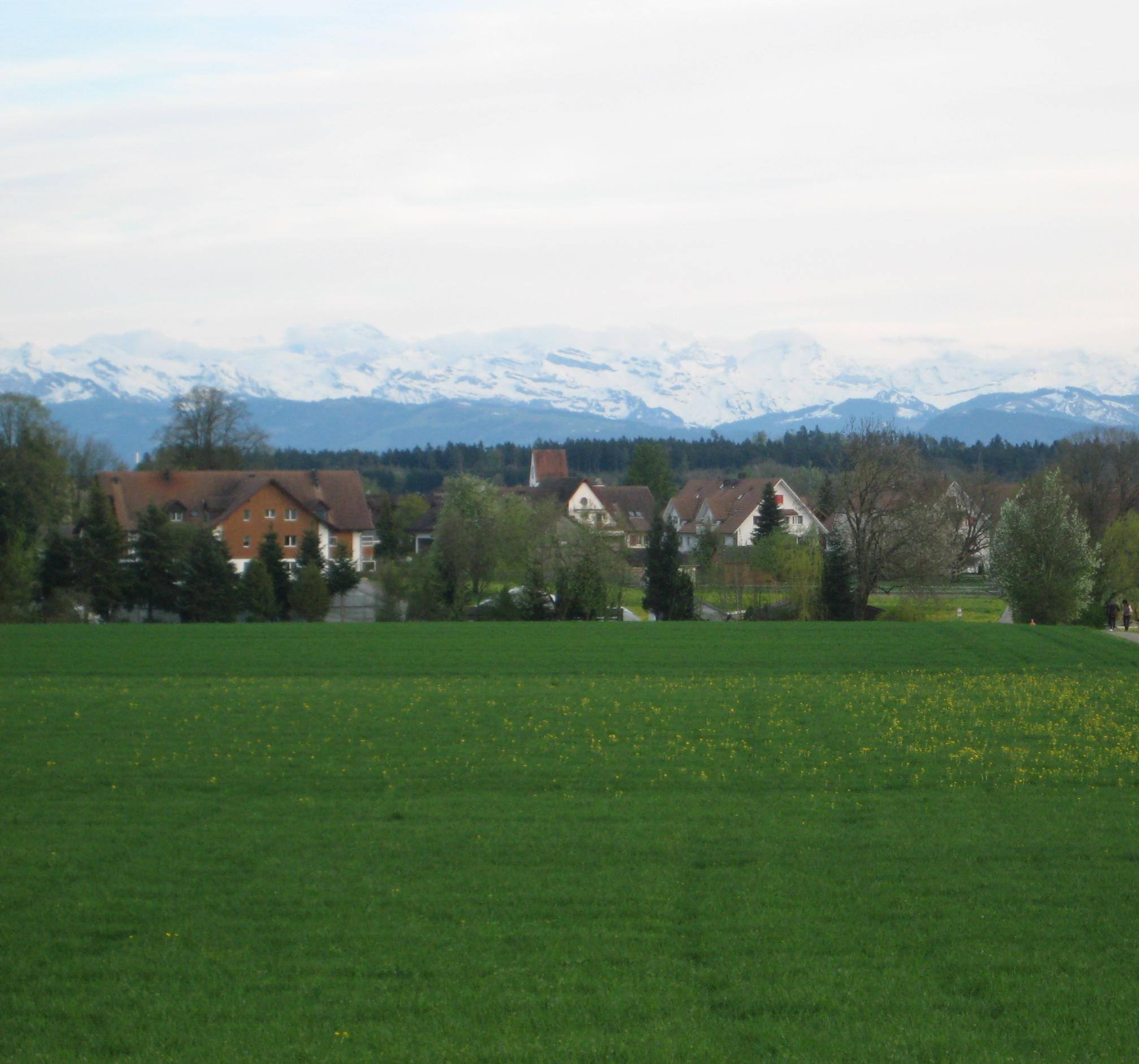 Blick auf Fehraltorf von Westen her